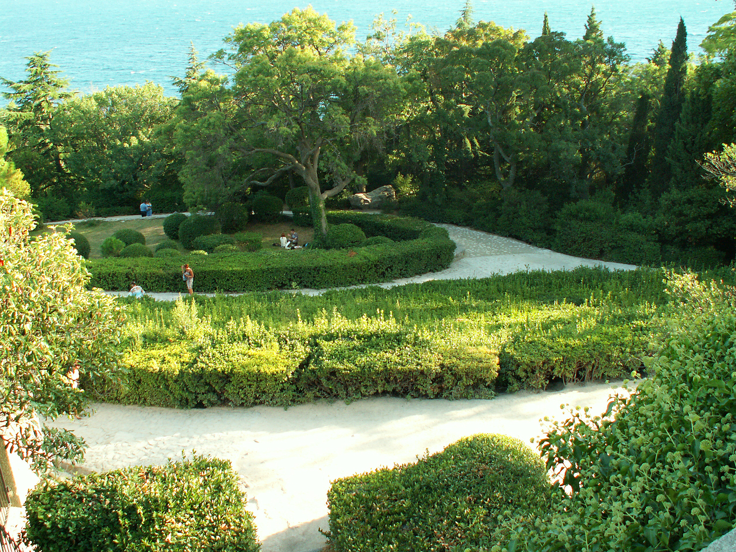 Алупкинский парк. Алупка. Крым. 2010 г.